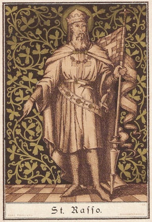 Litho St. Rasso